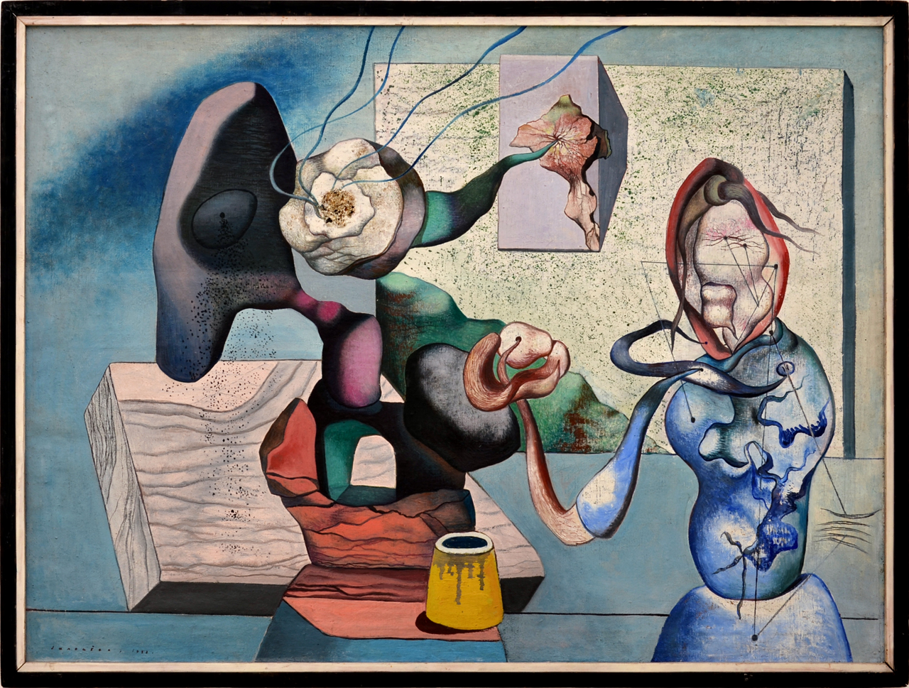 František Janoušek (1890-1943), Večeře stařeny, 1933, AJG Hluboká nad Vltavou